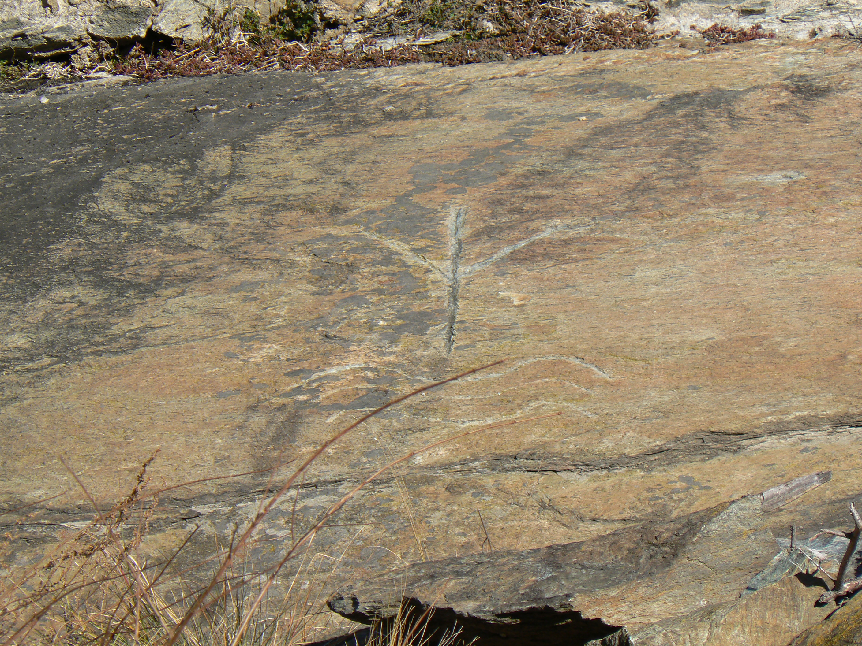 Sito archeologico preistorico di Chenal nei pressi del Castello di Chenal. Montjovet, Valle d'Aosta, Italia.